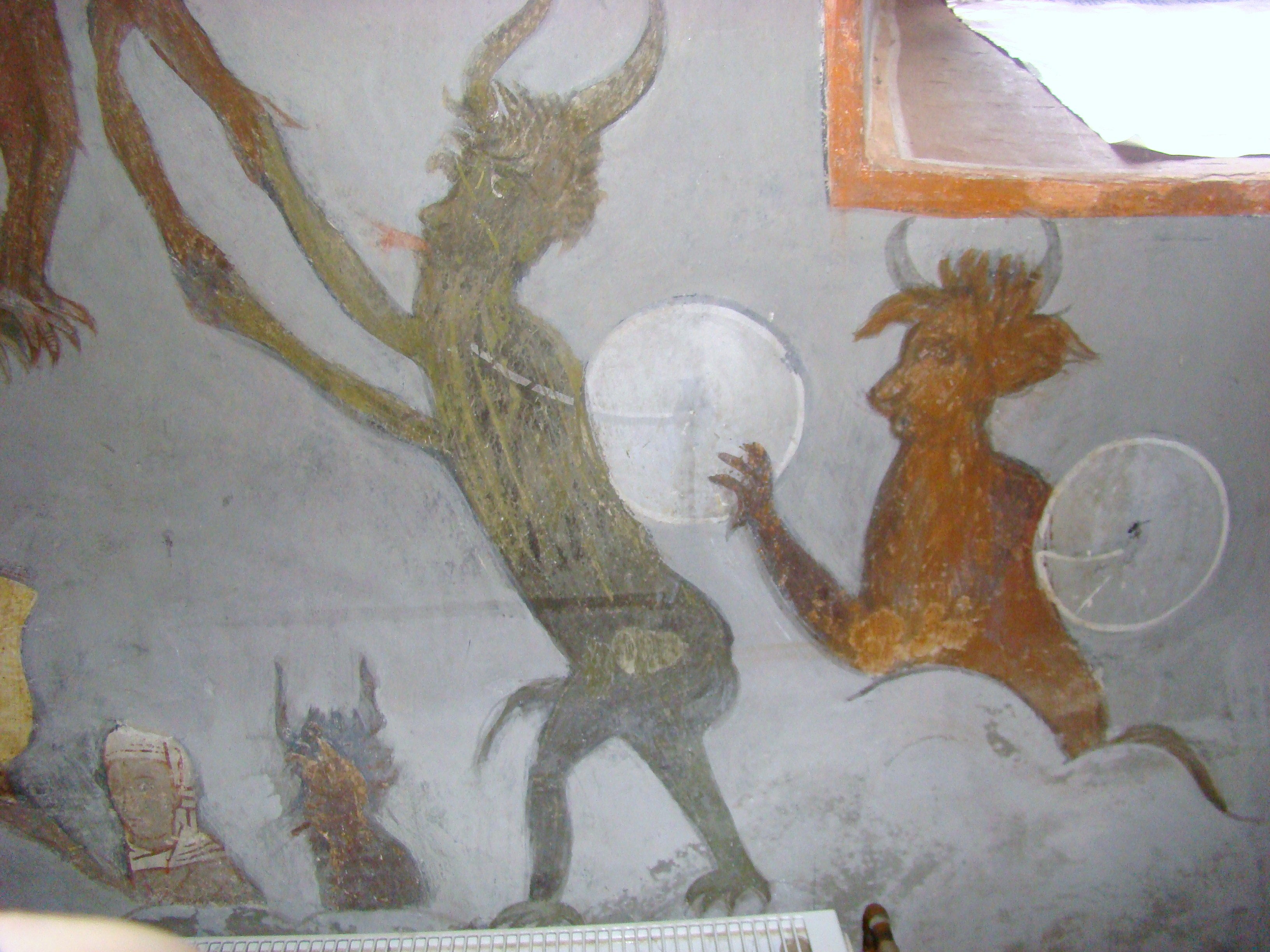 Biserica "Naşterea Domnului" , sat SĂRATA; comuna PORUMBACU DE JOS